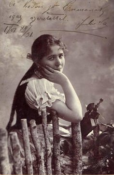 Gárdonyi Géza: A bor. Társulat: Nemzeti Színház, Budapest. Bemutató: 1901.03.29. Szereplők: Szunyog Rozi: Ligeti Juliska.